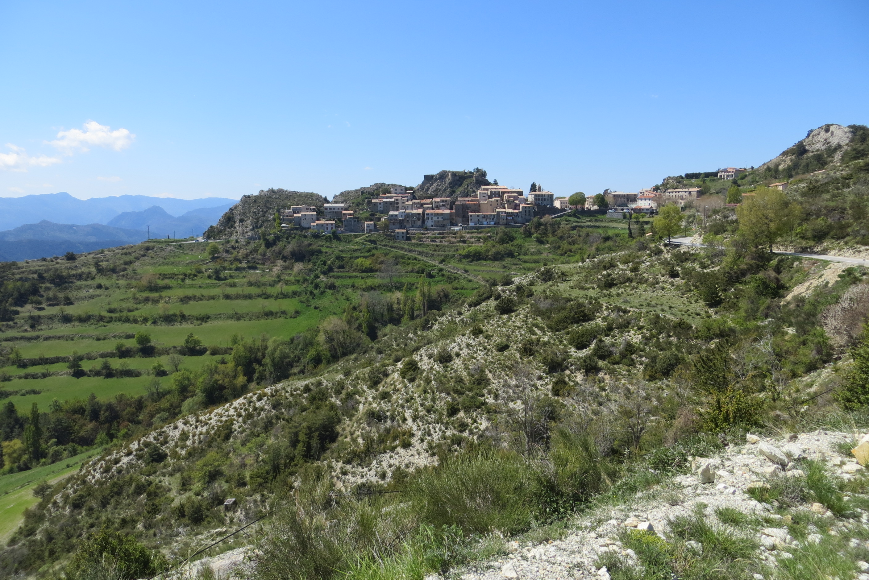 Village d'Ascros (Alpes-Maritimes) : vue générale depuis l'Est